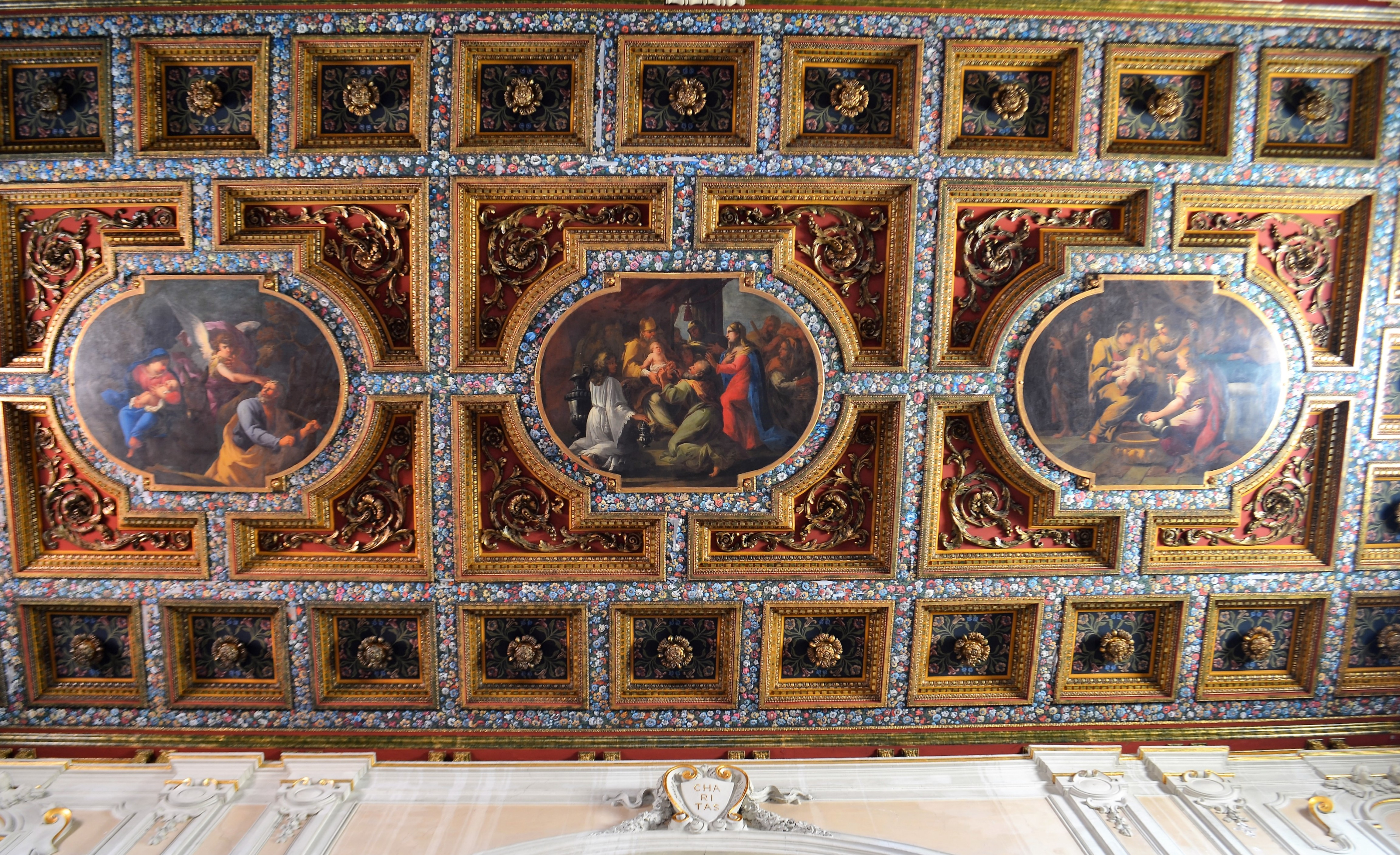 Chiesa di Santa Maria della Stella